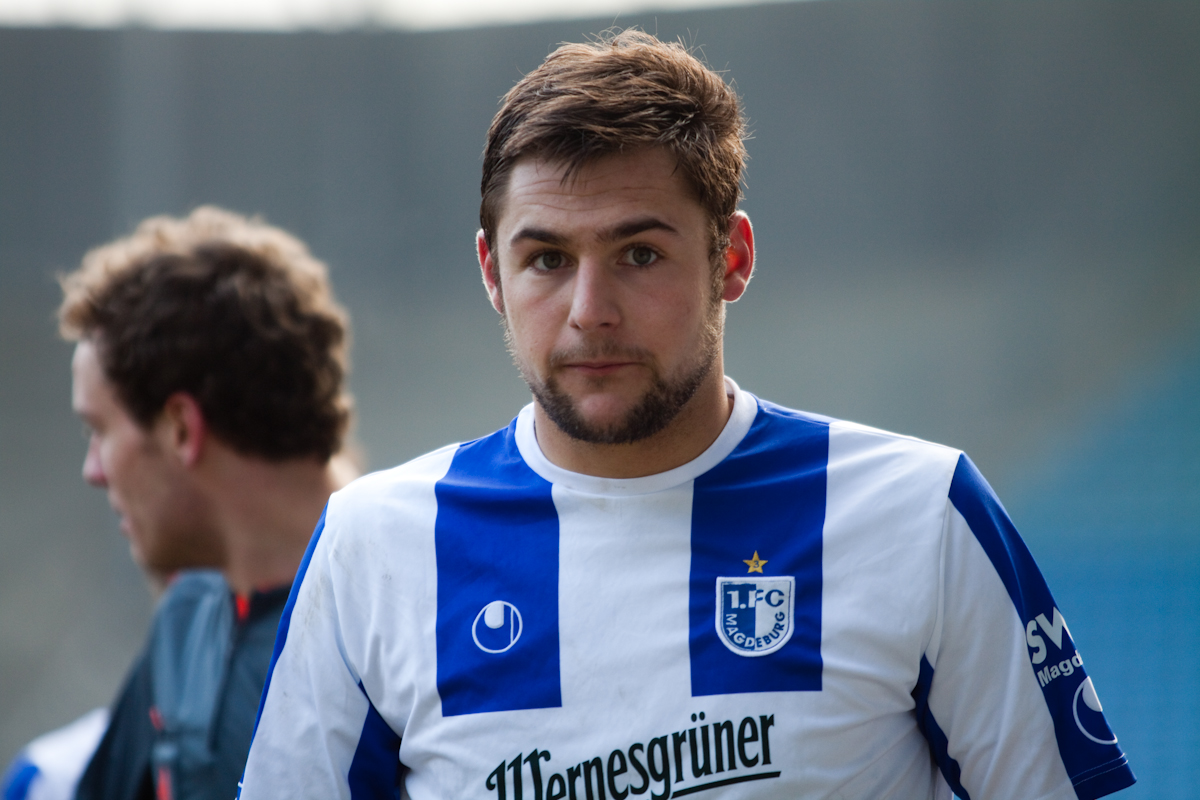 Simon Tüting im Trikot des 1.FC Magdeburg.